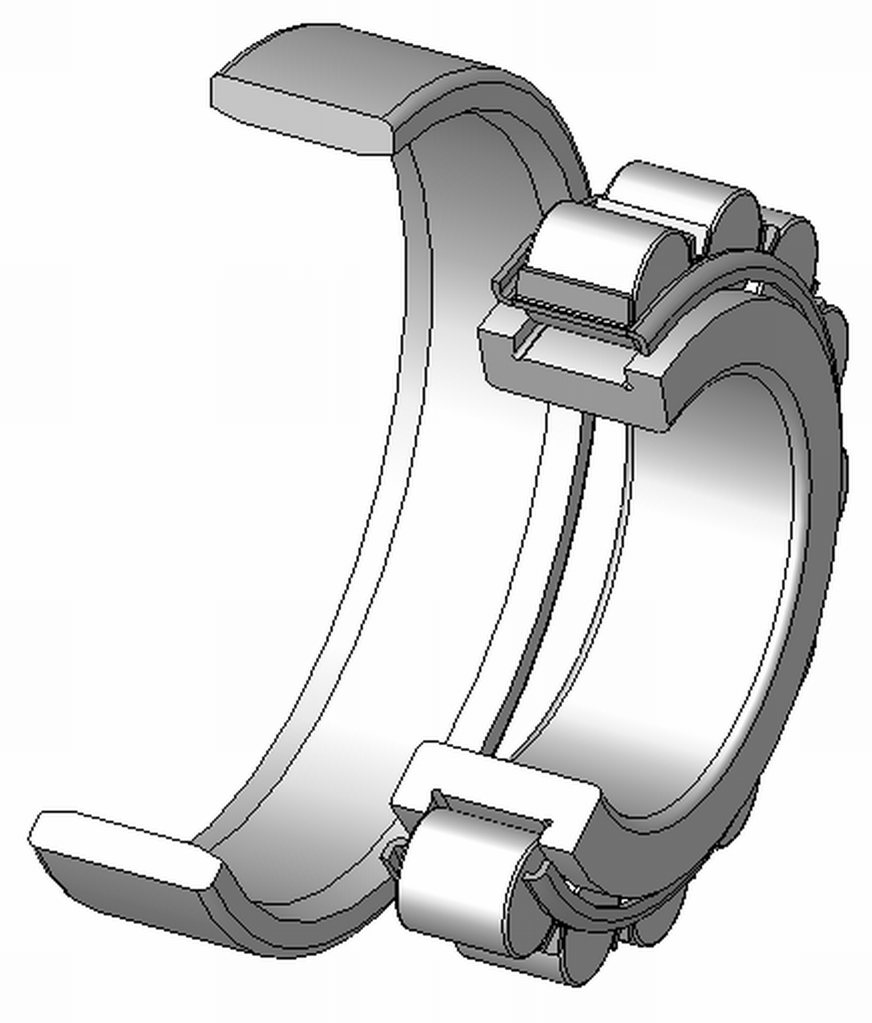 Zylinderrollenlager, Innenring mit beidseitigen Borden, Aussenring ohne Borde, Blechkaefig aus Stahl, zerlegbar, Explosionsdarstellung, 120°Schnitt, Hinweis: Innenaufbau des Lagers (insbesondere des Kaefigs) variiert je nach Hersteller und Baugroesse rolling contact bearings